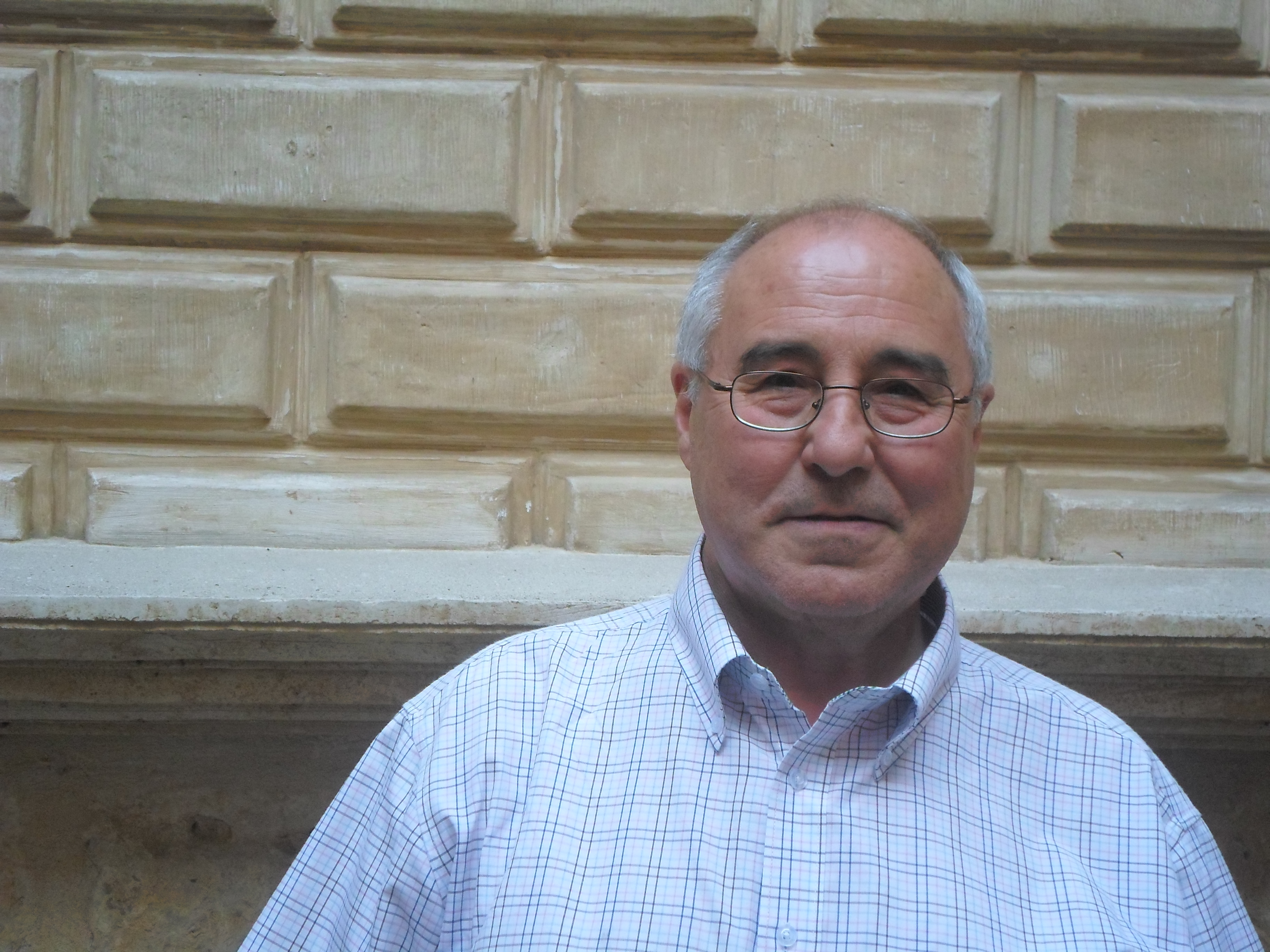 El poeta José Luis Puerto, durante las jornadas TIC'15 realizadas el 4 de junio en Valladolid, España